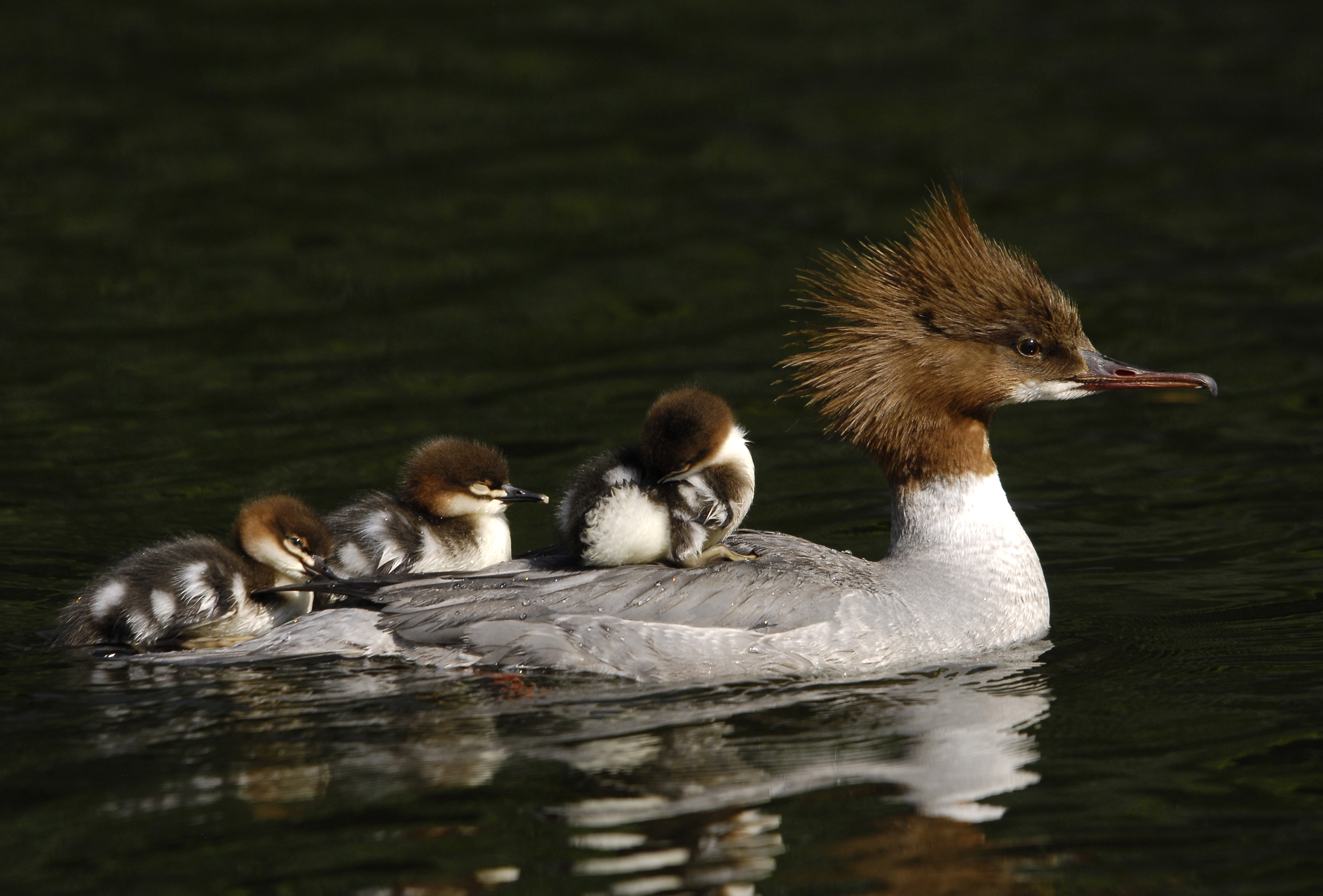 Mergus merganser. Jääkoskla ema oma poegadega.